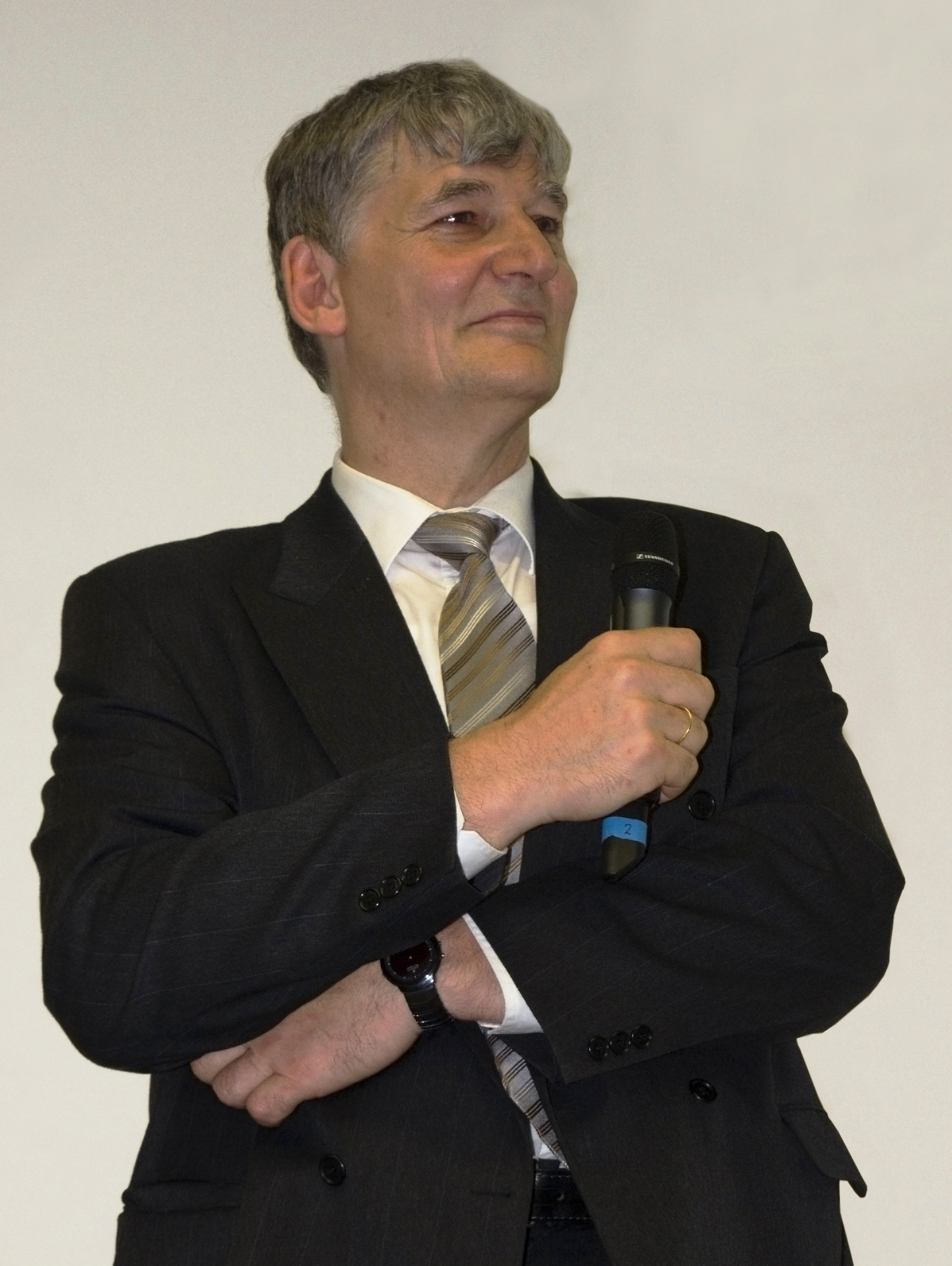 Ernst Schmachtenberg, Rektor der RWTH Aachen, einen Tag vor der Karlspreisverleihung 2009